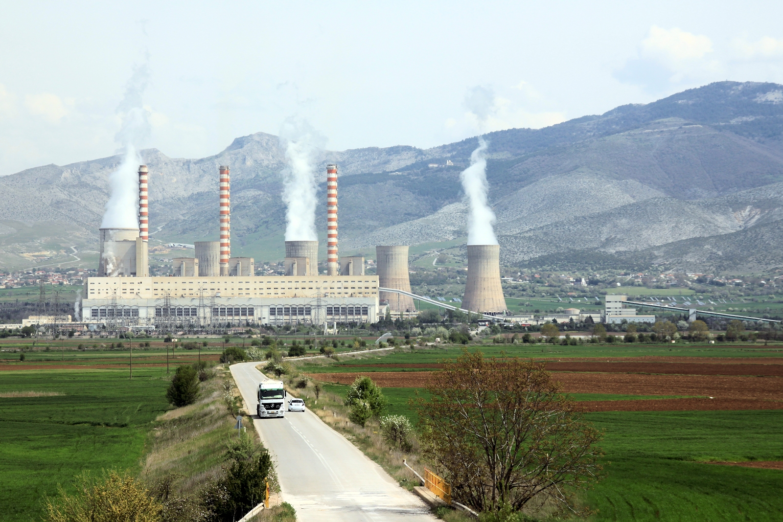 ΑΗΣ